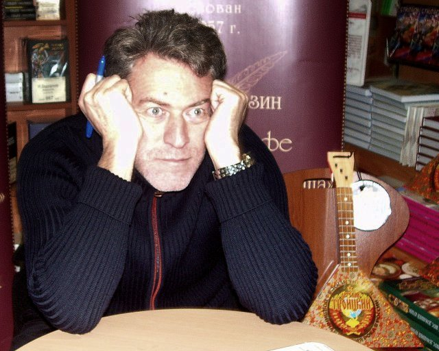 Артемий Троицкий на презентации